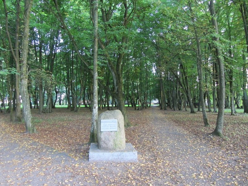 Вялікае Мажэйкава. Парк